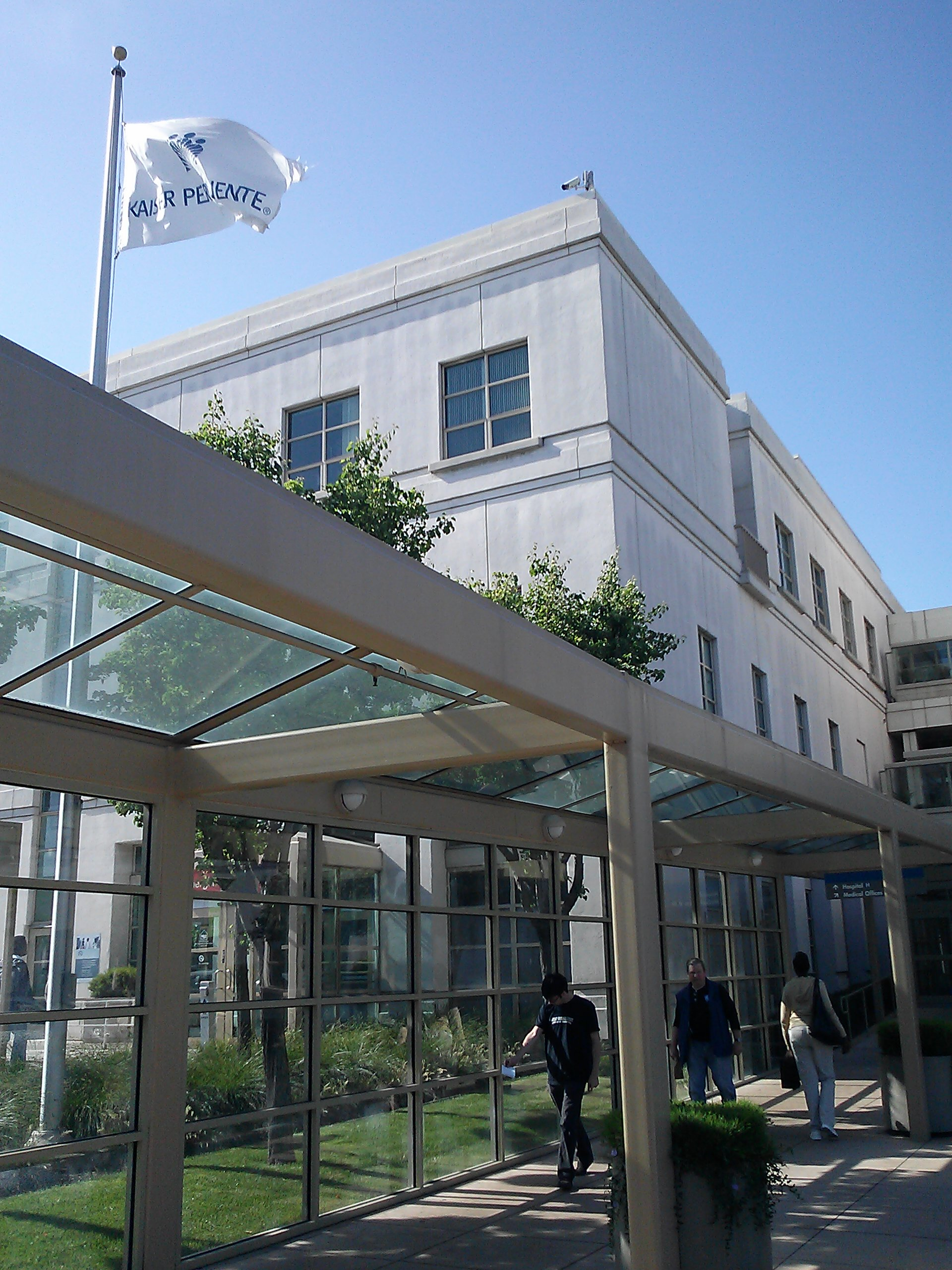 Sky view pharmacy